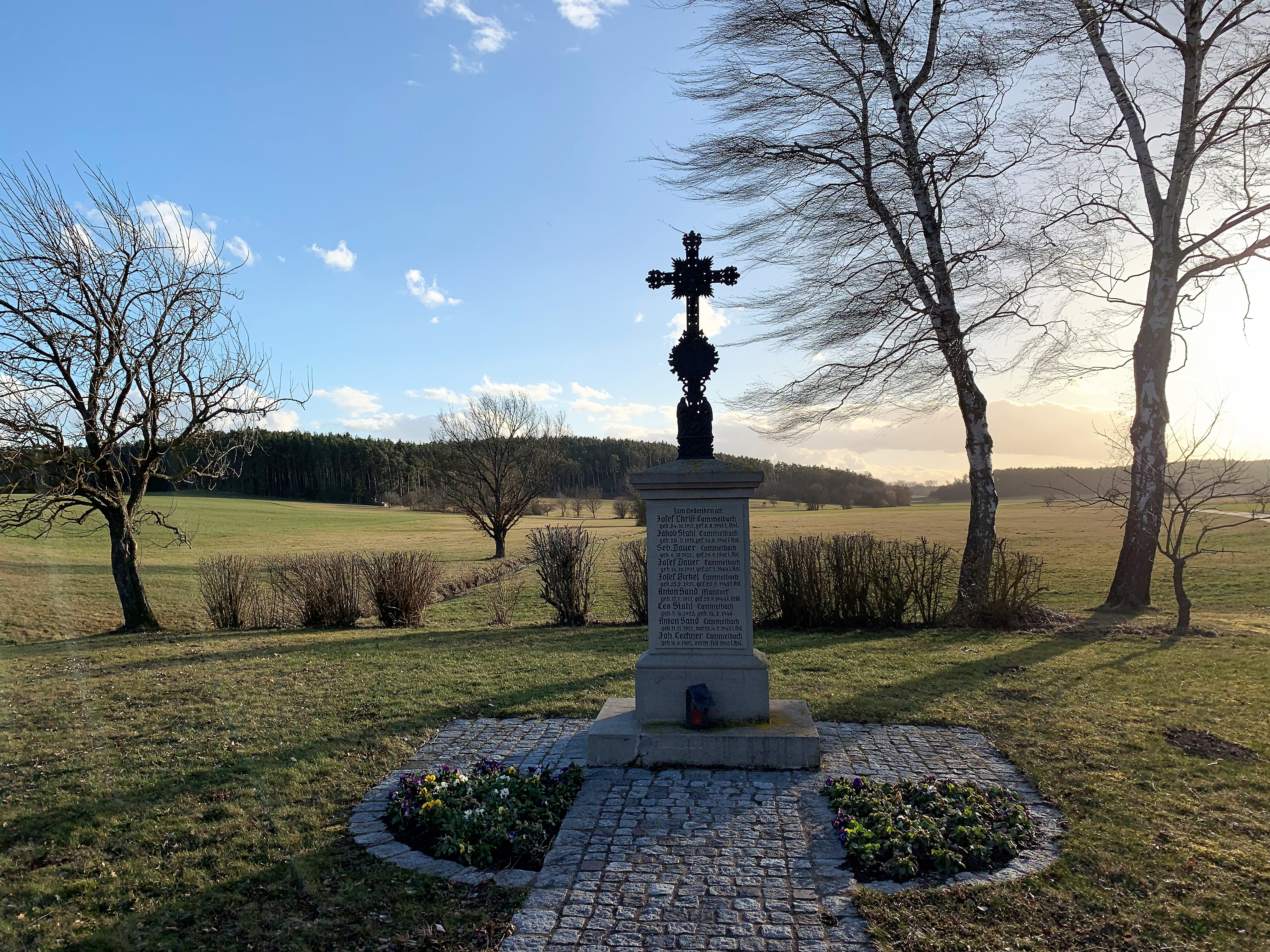 Kriegerdenkmal von Lammelbach, Gemeinde Herrieden, Gründlesfeld: Bayerische Denkmalliste, Akten-Nr. D-5-71-166-91